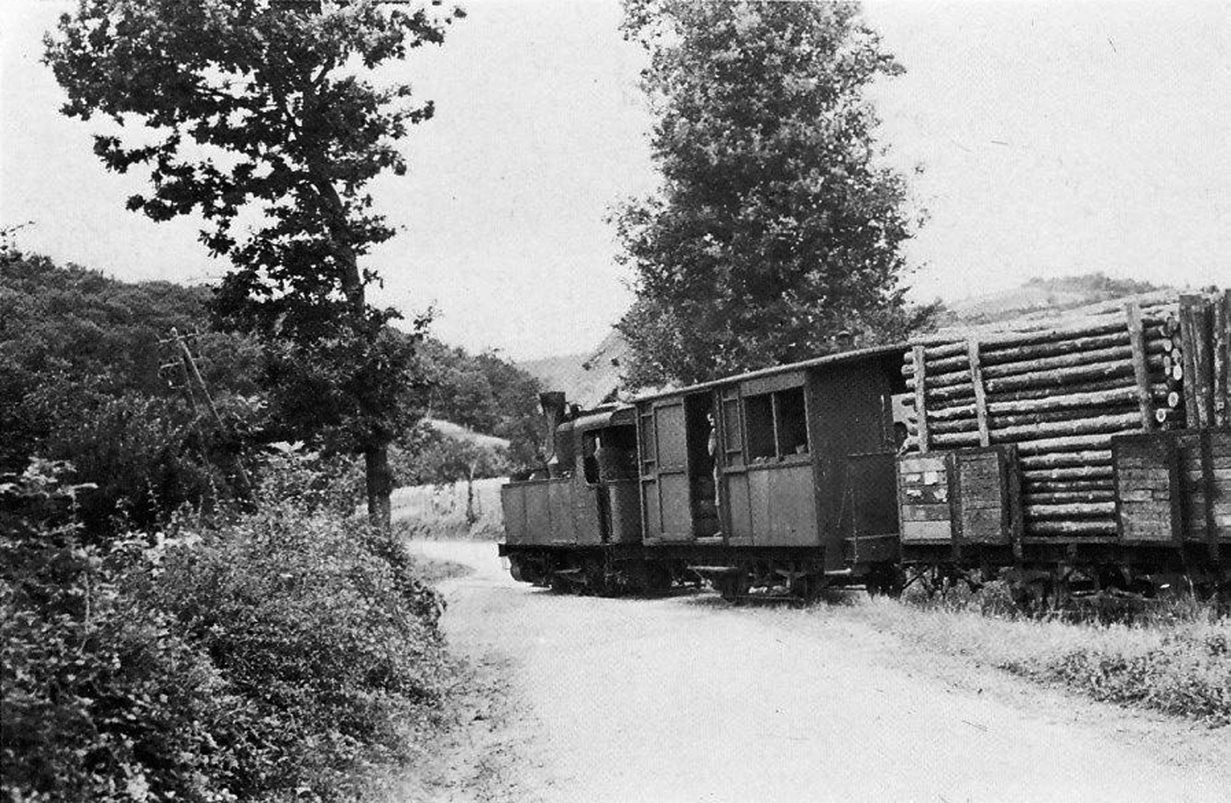 French metre gauge